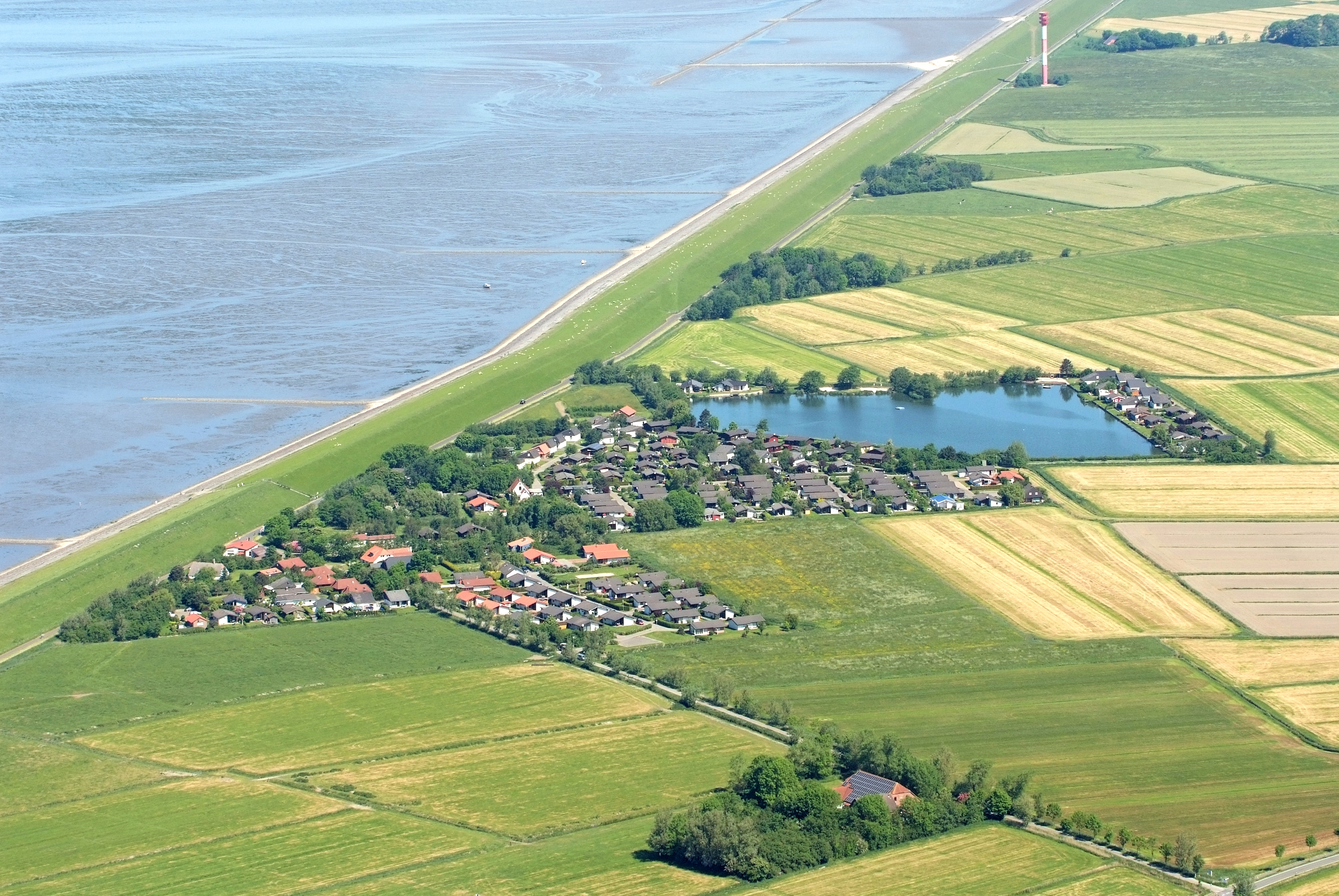 Fotoflug vom Flugplatz Nordholz-Spieka über Cuxhaven und Wilhelmshaven